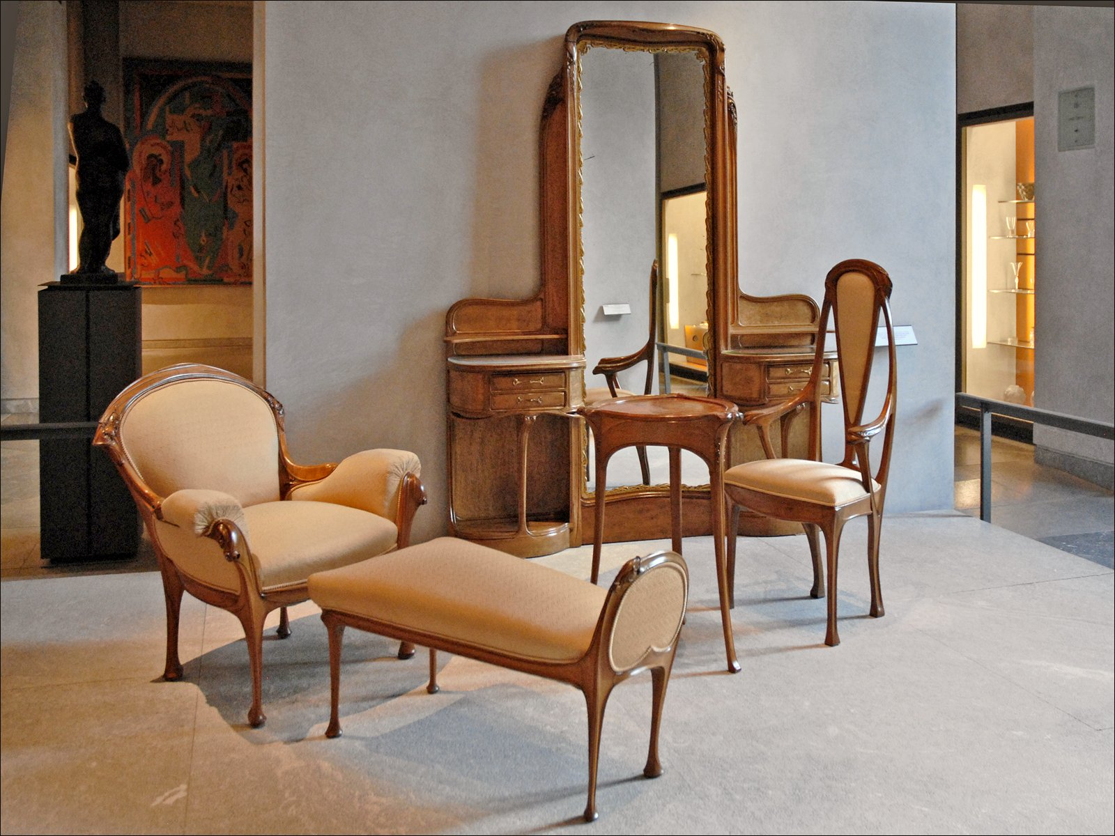 Mobilier provenant de la Chambre à coucher de l'Hôtel Guimard (122 avenue Mozart à Paris) 1909-1912 Tous les meubles sont des créations d'Hector Guimard (Lyon 1867 - New-York 1942) Poirier, érable moucheté chef-d'oeuvre du musée Site du musée Don d'Adeline Oppenheim-Guimard (1872-1962)